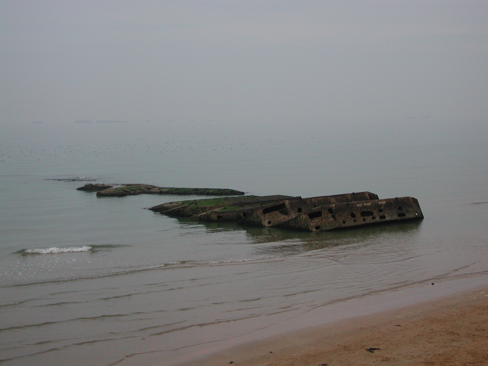 Reste du port Artificielle "Mulberry B" d'Arromanches-les-Bains crées pendant le débarquement de Normandie en 1944. Photo prise en 2002 près du musée d'Arromanches. On remarque ici comme la mer et le ciel se confond a l'horizon et comment on distingue a peine les contours des barges au loin.